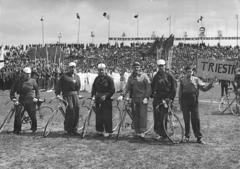 Radrennfahrer, Mannschaft aus Triest Das grosse internationale Radrennen des Friedens Warschau-Prag Prag-Warschau Am 28. April 1950, dem 30. Jahrestag der Polnischen Radrenn-Union, starteten die Radrennmannschaften aus allen Teilen der Welt zur frohen Fahrt Warschau-Prag, Prag-Warschau, die zu einer internationalen Demonstration für den Frieden wurde. Eine deutsche Delegation nimmt an dieser Fahrt teil. UBz: Eine Delegation aus Triest Aufn.: Illus 6.5.50 9 6420-50-V Leihweise Illus Berlin ws